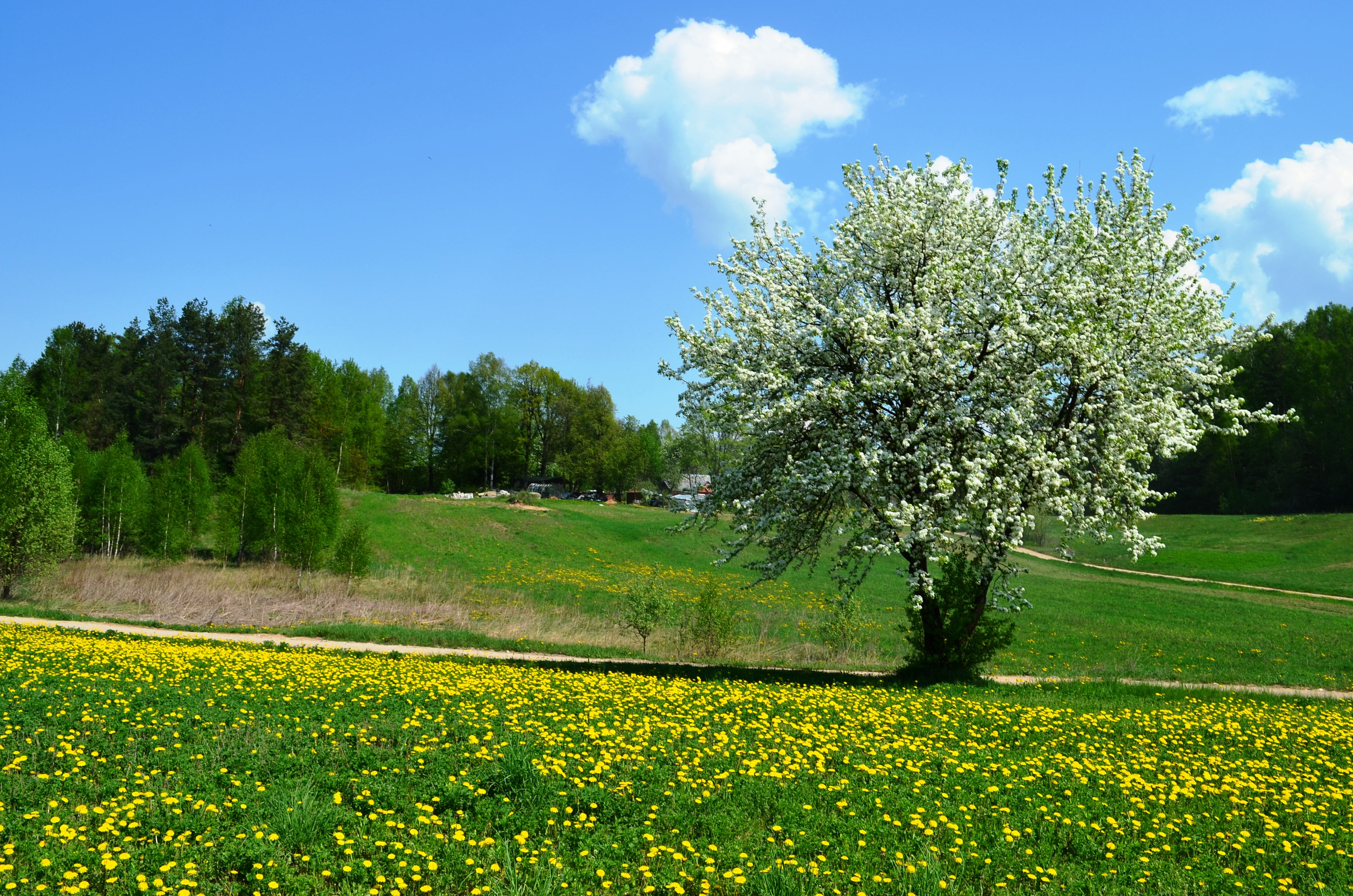 Bajorai, Avižienių sen., Vilniaus raj.